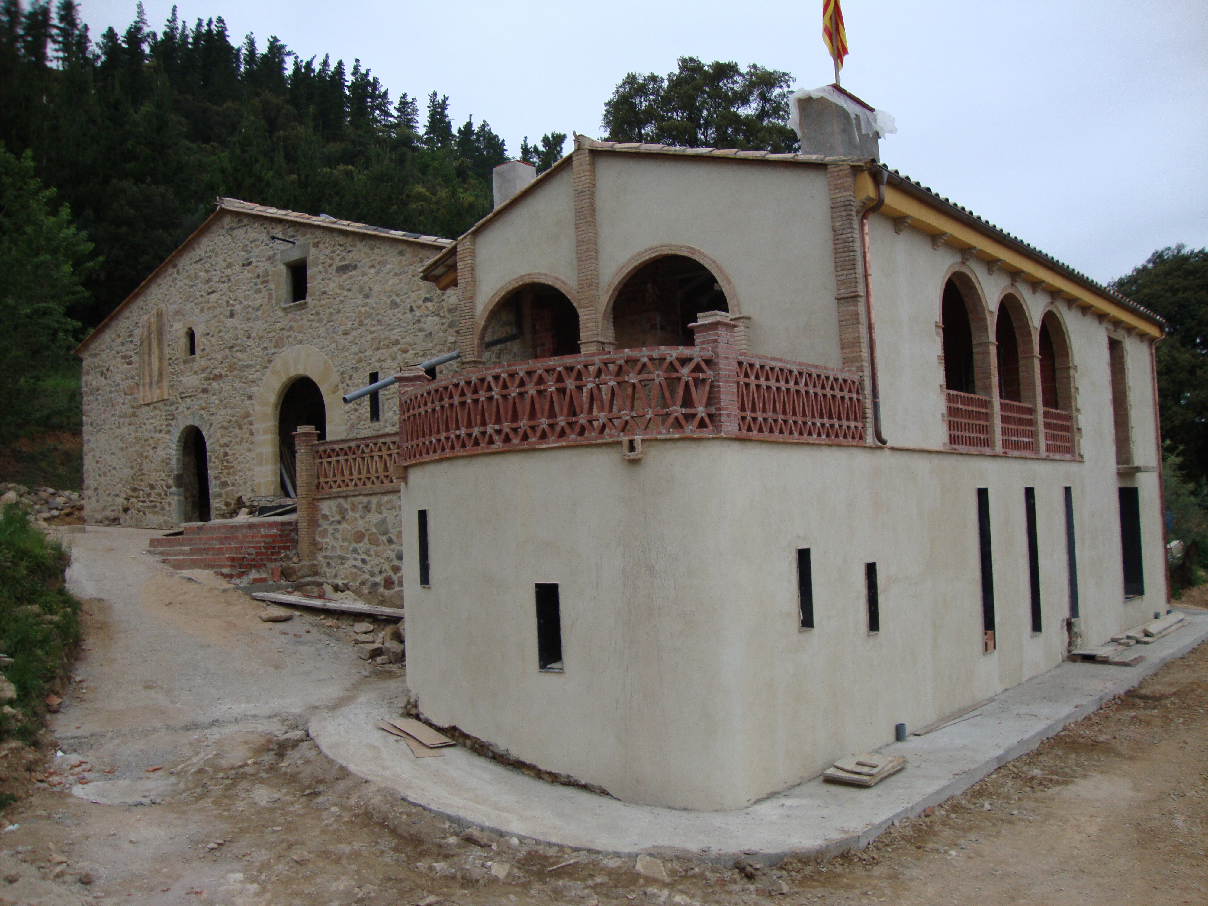 Can Camps durant les obres realitzades el 2012 (Anglès, la Selva)